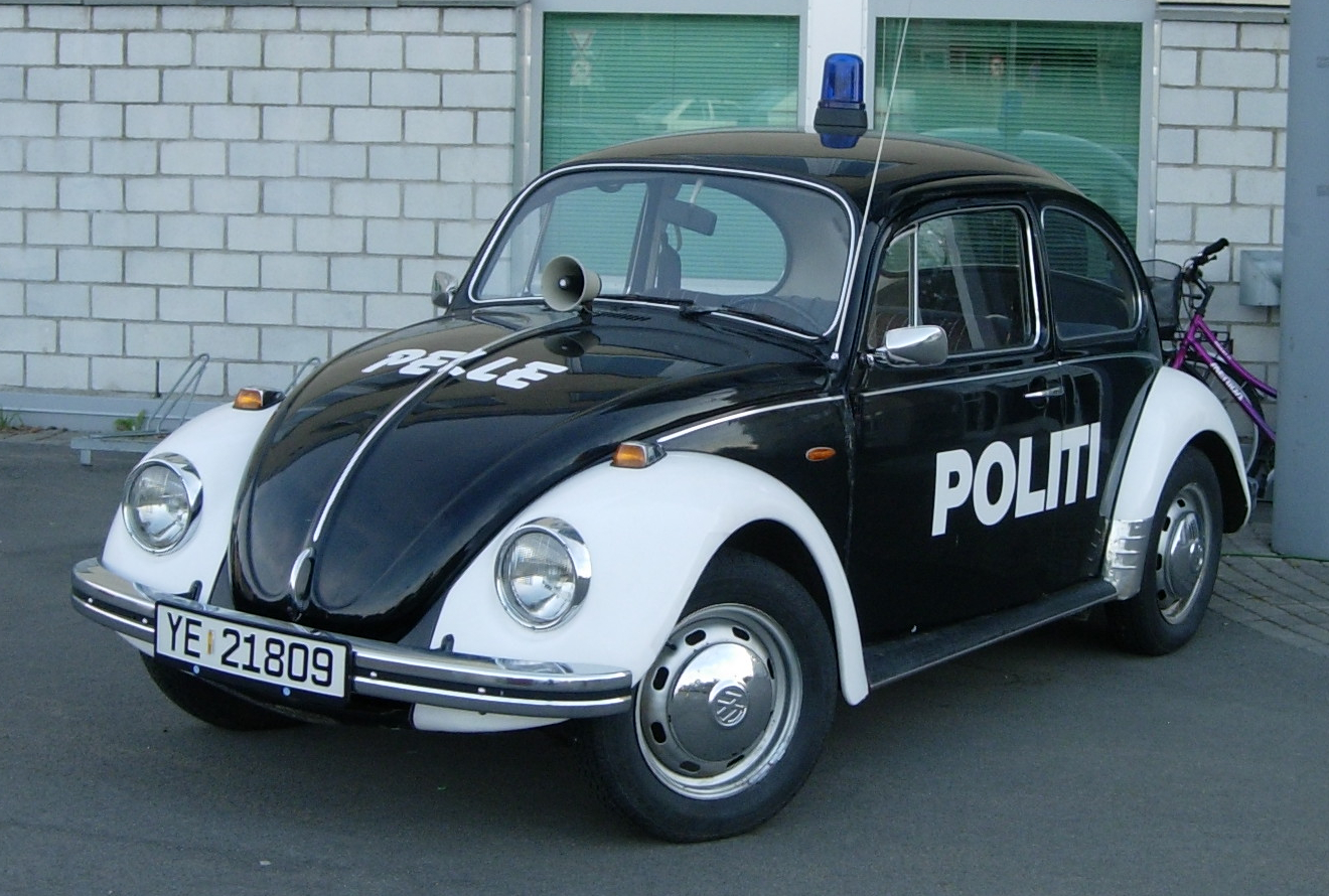 Pelle Politibil utenfor Salten Politidistrikts kontor i Bodø